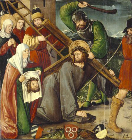 Christi Kreuztragung